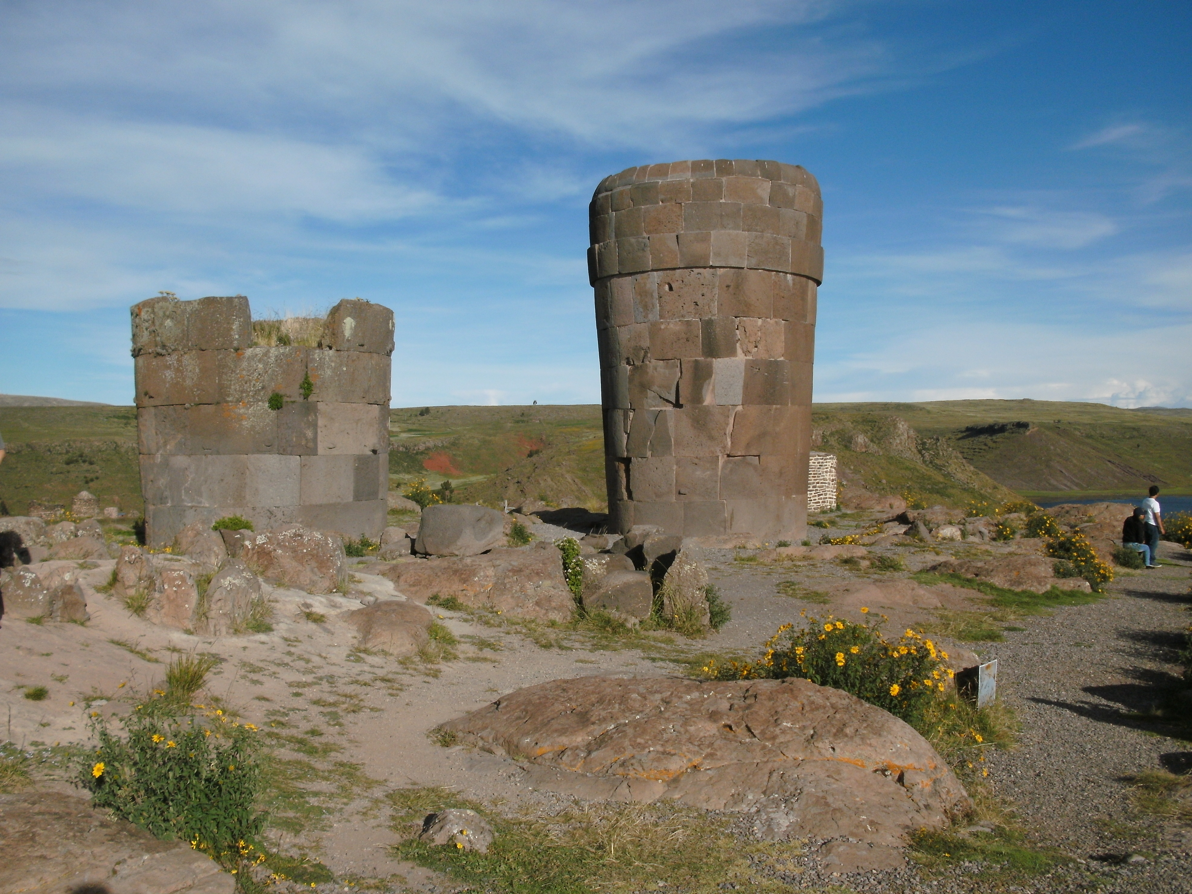 Bild